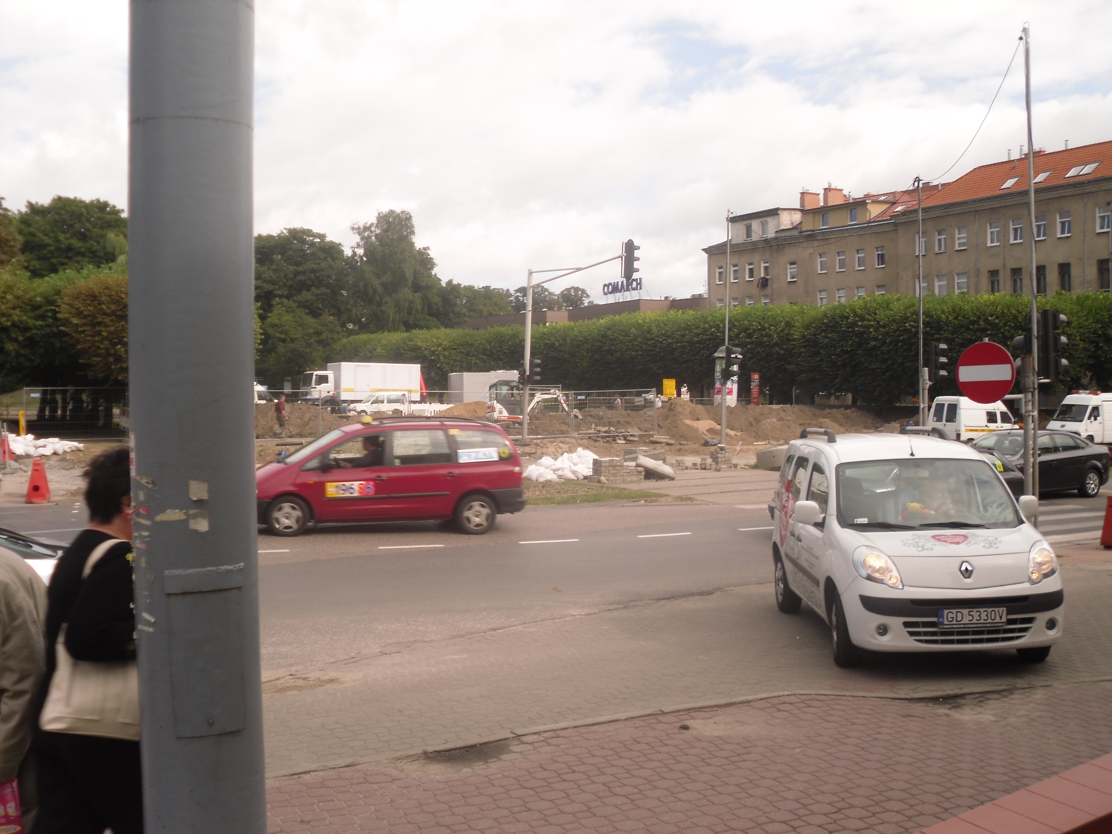 Miejsce, gdzie znajdowała się Brama Siedlecka w Gdańsku